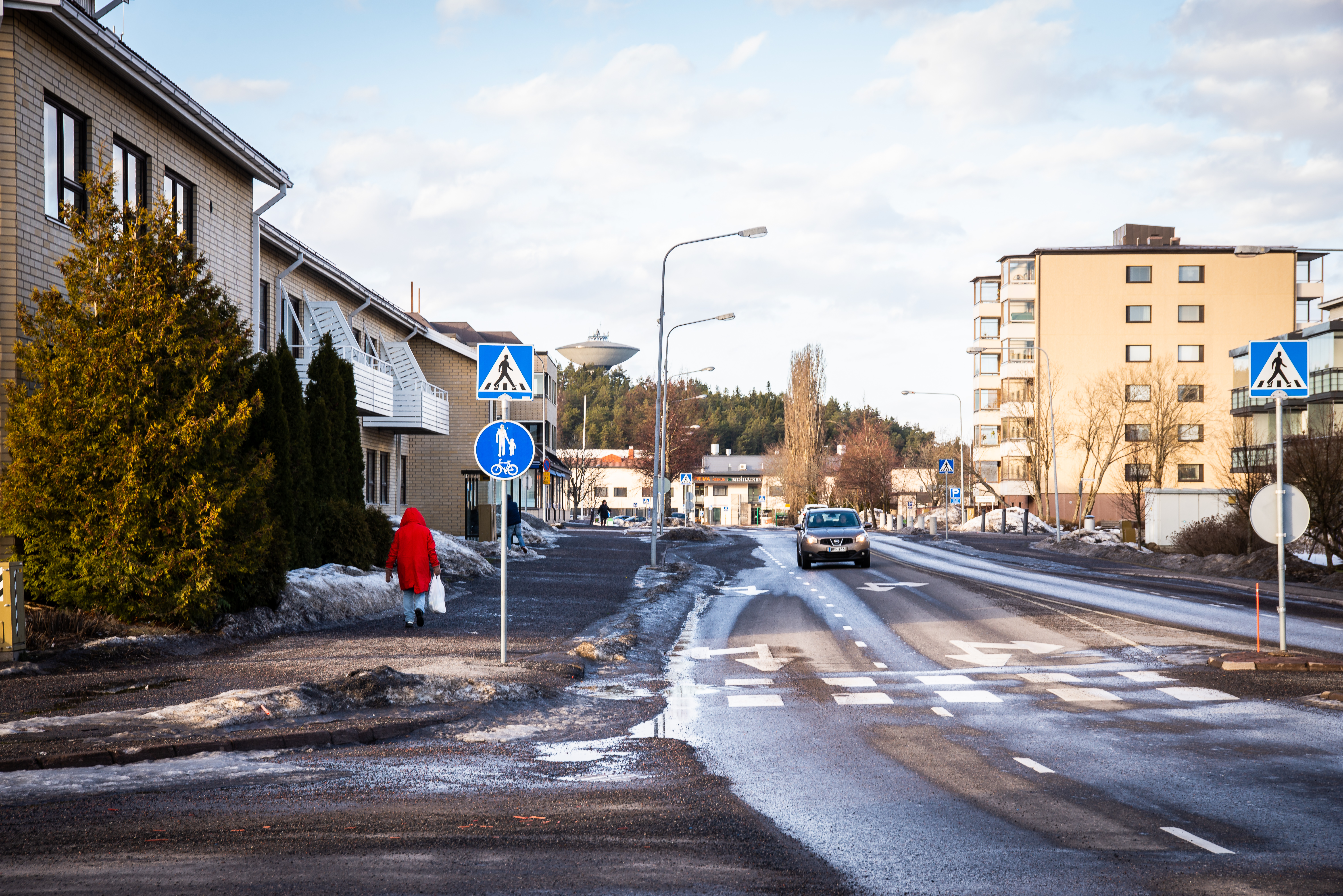 Liedon keskustan läpi kulkeva Hyvättyläntie helmikuussa 2019